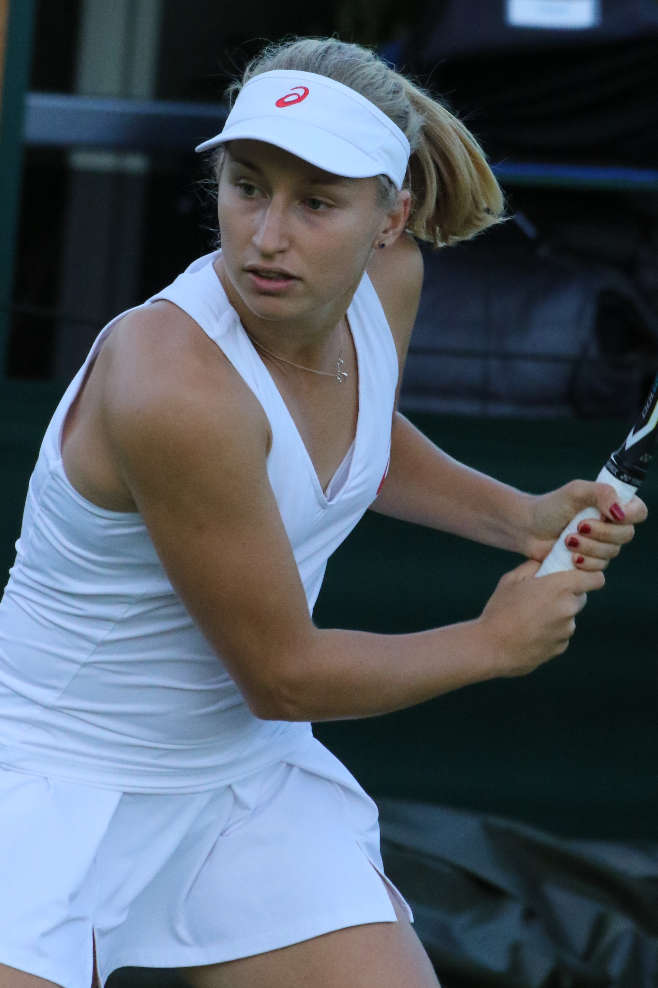 Gavrilova WM16 (10)